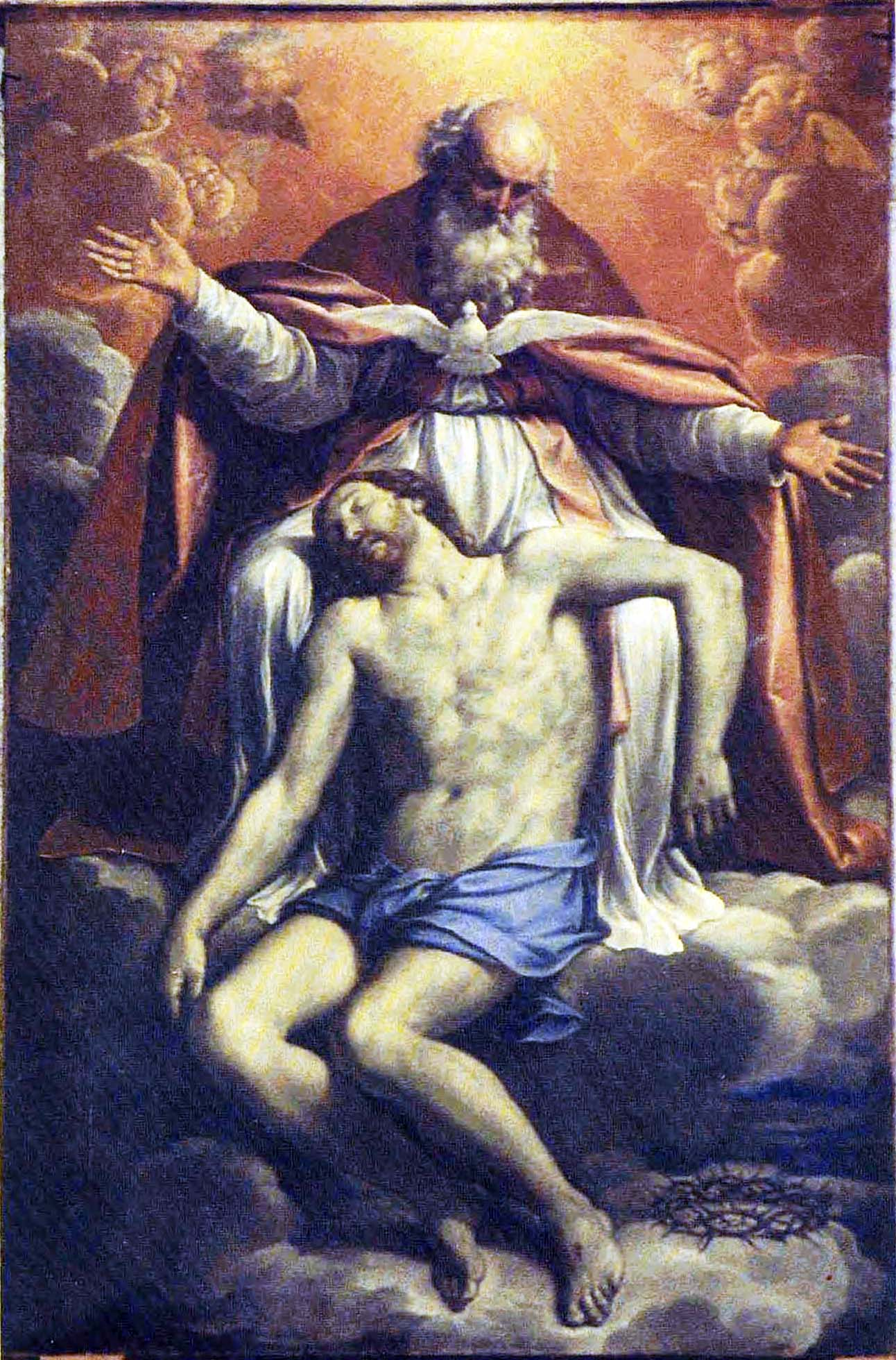 Trinità